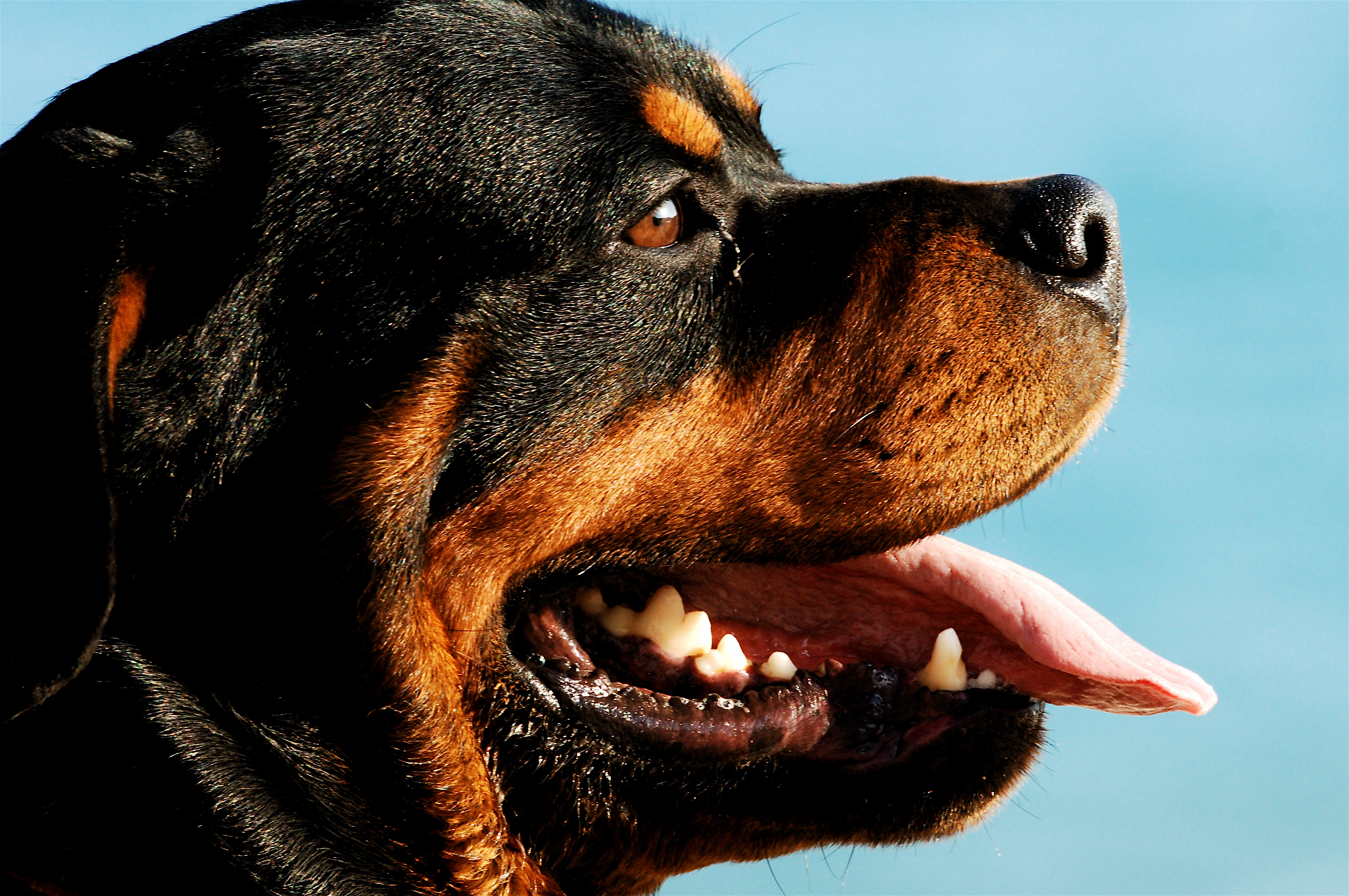 A Rottweiler in Sesimbra, Portugal.